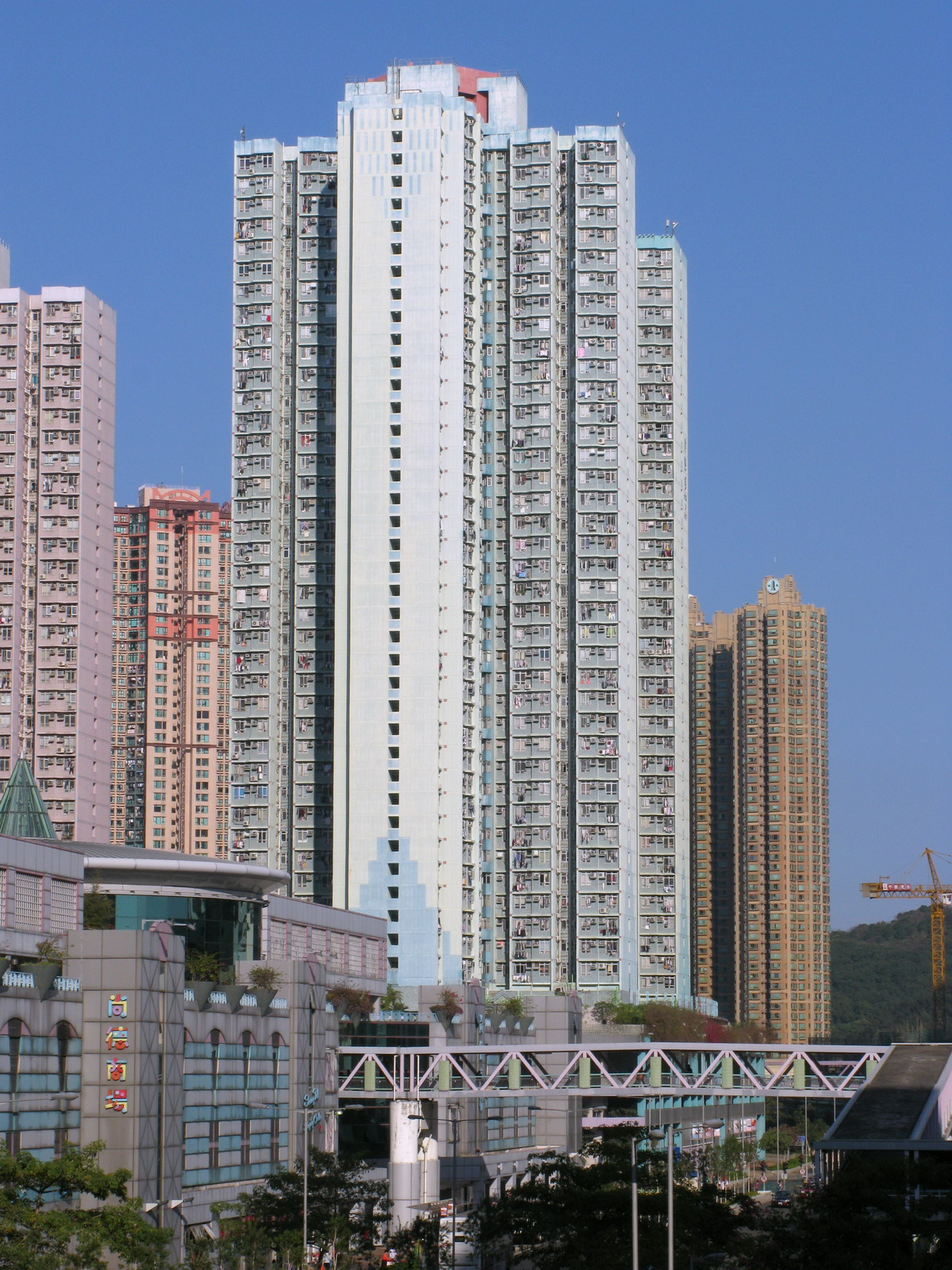 尚德邨 Sheung Tak Estate